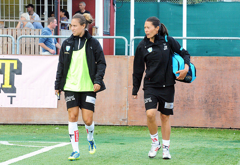 Catrine Johansson (left) and Jane Törnqvist (right) of Kopparbergs/Göteborg FC